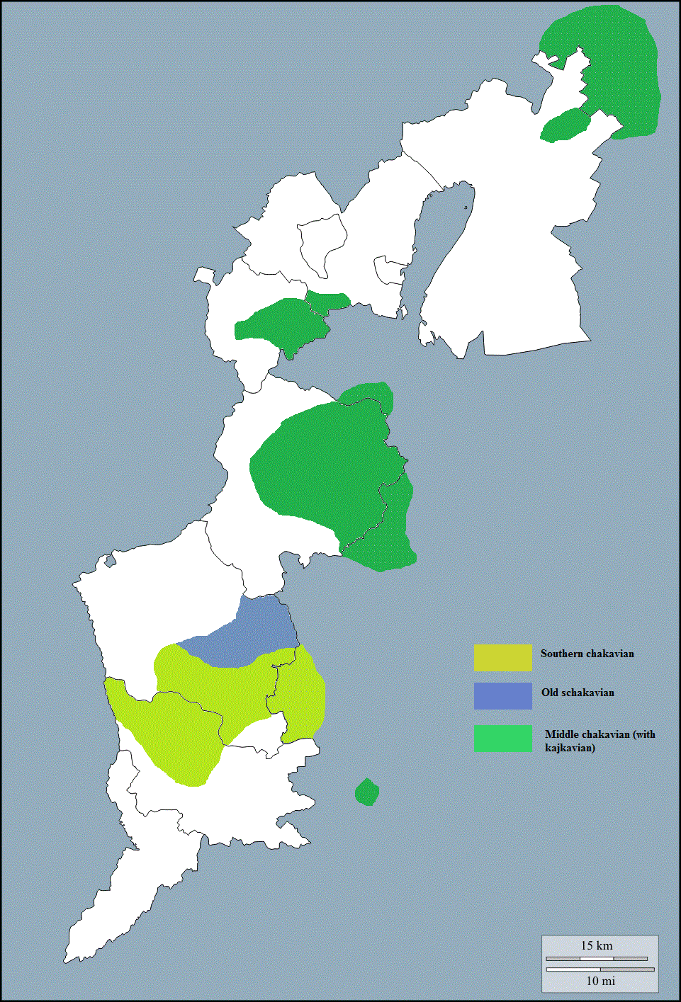 Dijalekti u gradišću